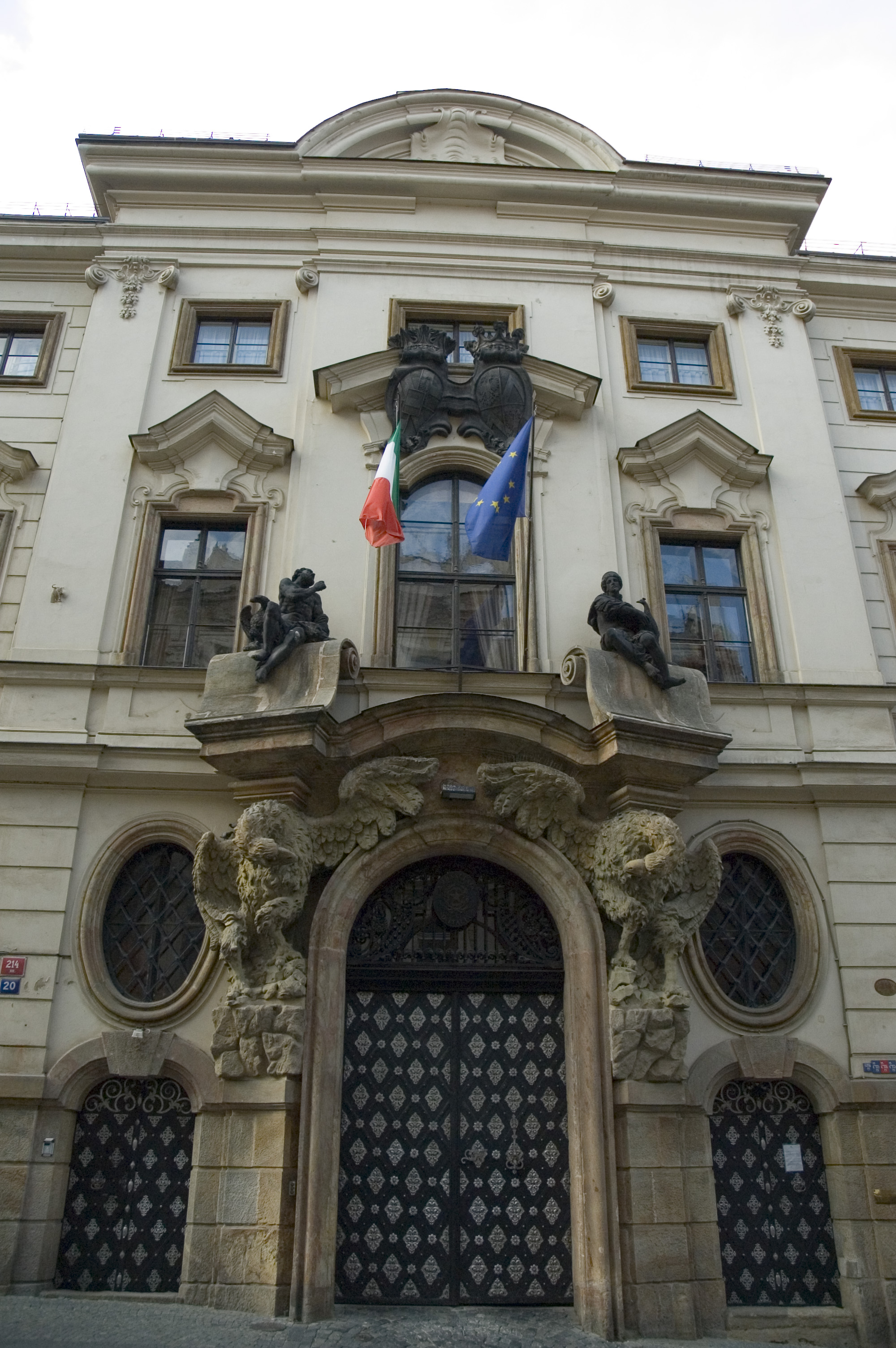 Praga: ambasciata italiana